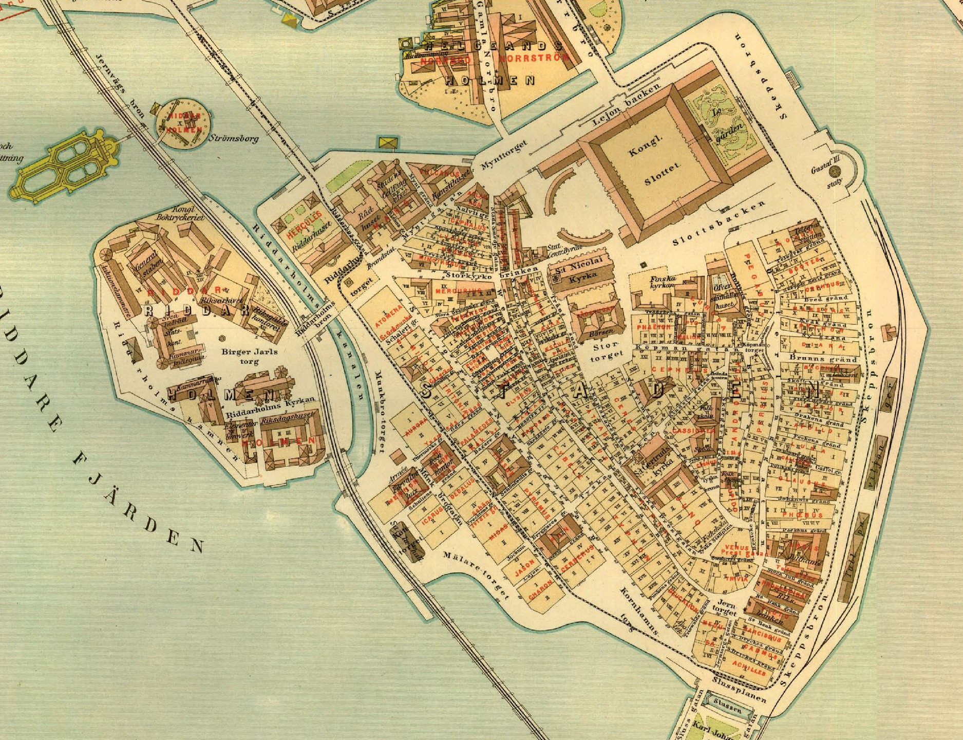 Del av "Karta öfver Stockholm upprättad och utgifven av A.R. Lundgren år 1885" visande Gamla stan